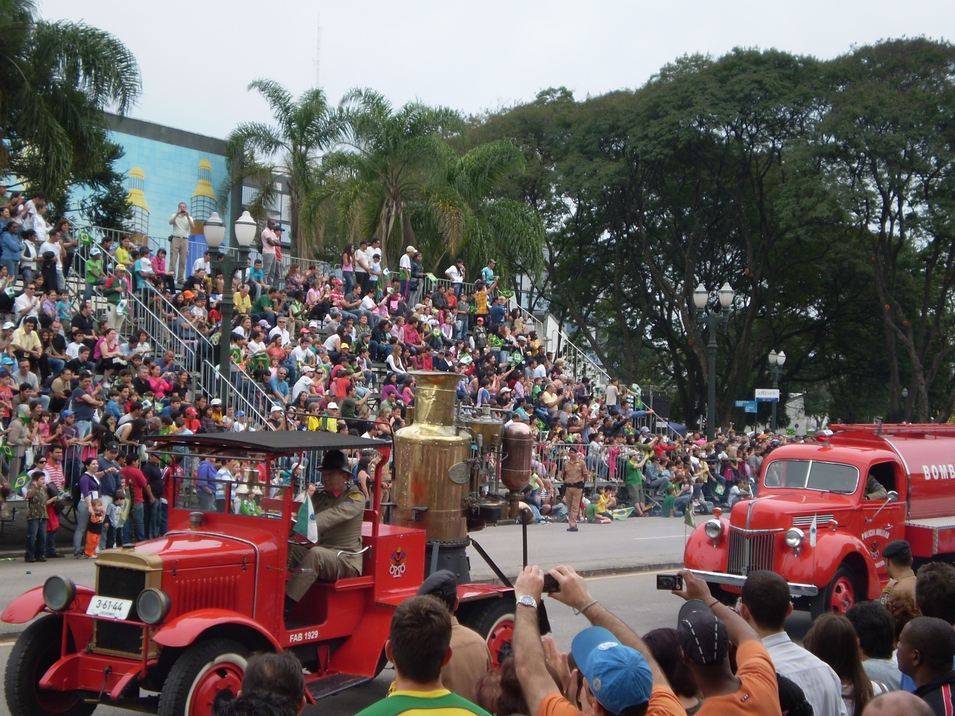 Carros históricos do Corpo de Bombeiros da PMPR, no desfile de sete de setembro de 2009.